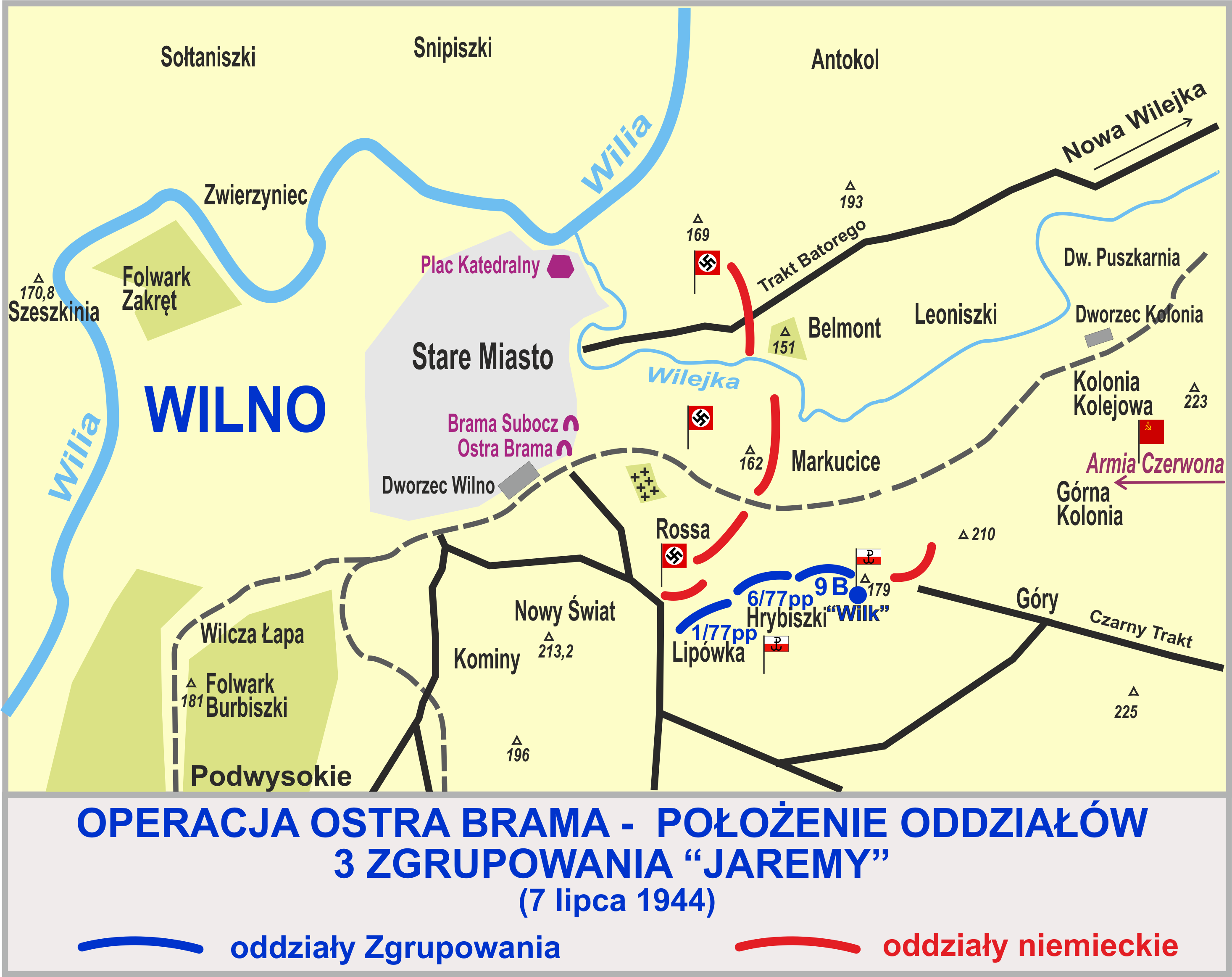 Operacja Ostra Brama - położenie oddziałów 3 Zgrupowania "Jaremy" w dniu 7 lipca 1944